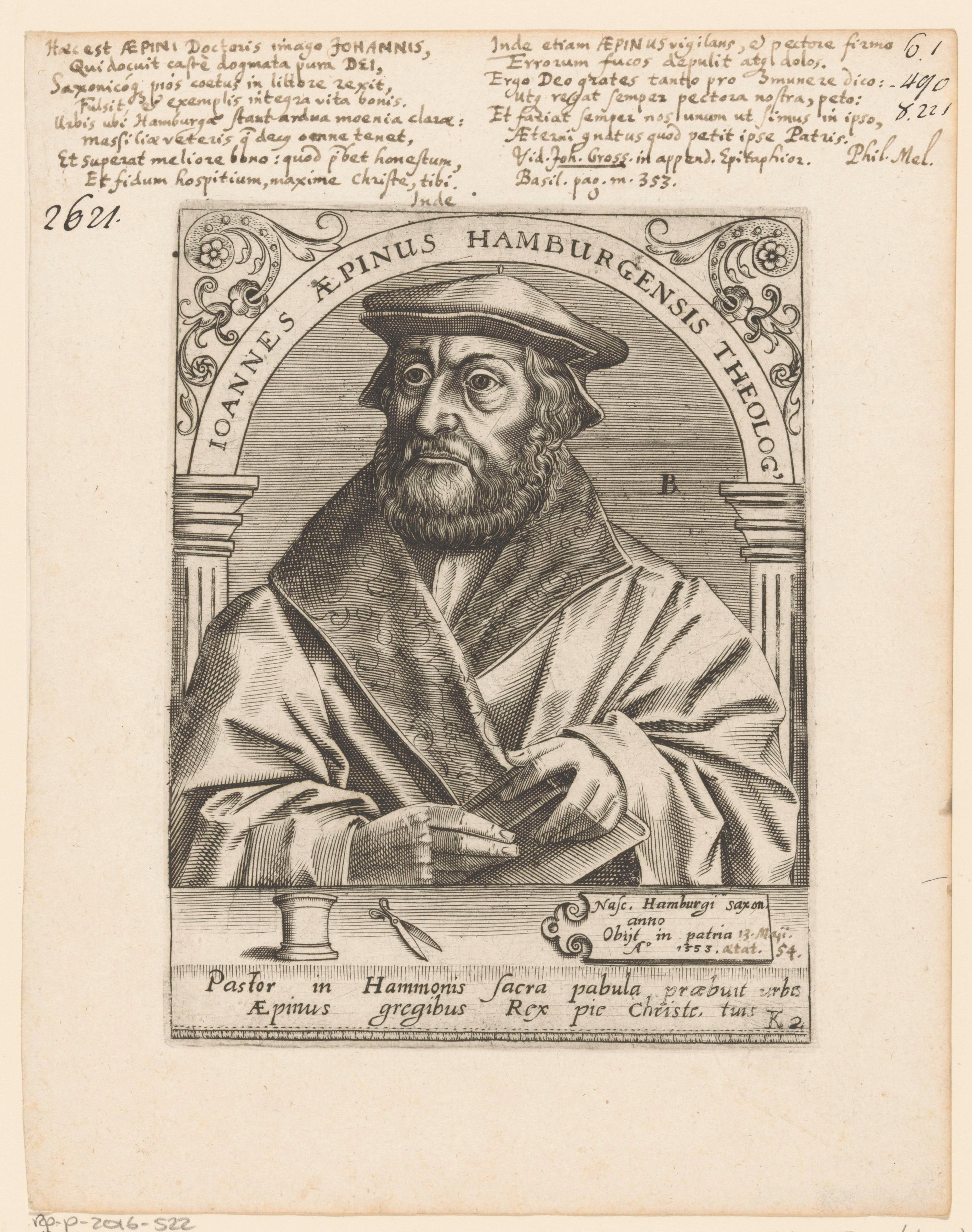 IdentificatieTitel(s): Portret van Johannes AepinusObjecttype: prent Objectnummer: RP-P-2016-522Opschriften / Merken: opschrift, recto, handgeschreven: ‘Haec est (...) Basil. pag. nr. 353.’Omschrijving: Portret van Johannes Aepinus onder een boog met randschrift. Hij heeft een boek in zijn handen. Op de voorgrond ligt een aantal objecten. In een kader zijn geboorteplaats, zijn sterfplaats en zijn sterfjaar. In de ondermarge twee regels Latijnse tekst. Rechtsonder: K 2.VervaardigingVervaardiger: prentmaker: Robert Boissard (vermeld op object)Plaats vervaardiging: ElzasDatering: ca. 1580 - 1611Fysieke kenmerken: gravureMateriaal: papier Techniek: graveren (drukprocedé)Afmetingen: plaatrand: h 138 mm × b 106 mmOnderwerpWie: Johannes AepinusVerwerving en rechtenVerwerving: onbekend 2016Copyright: Publiek domein